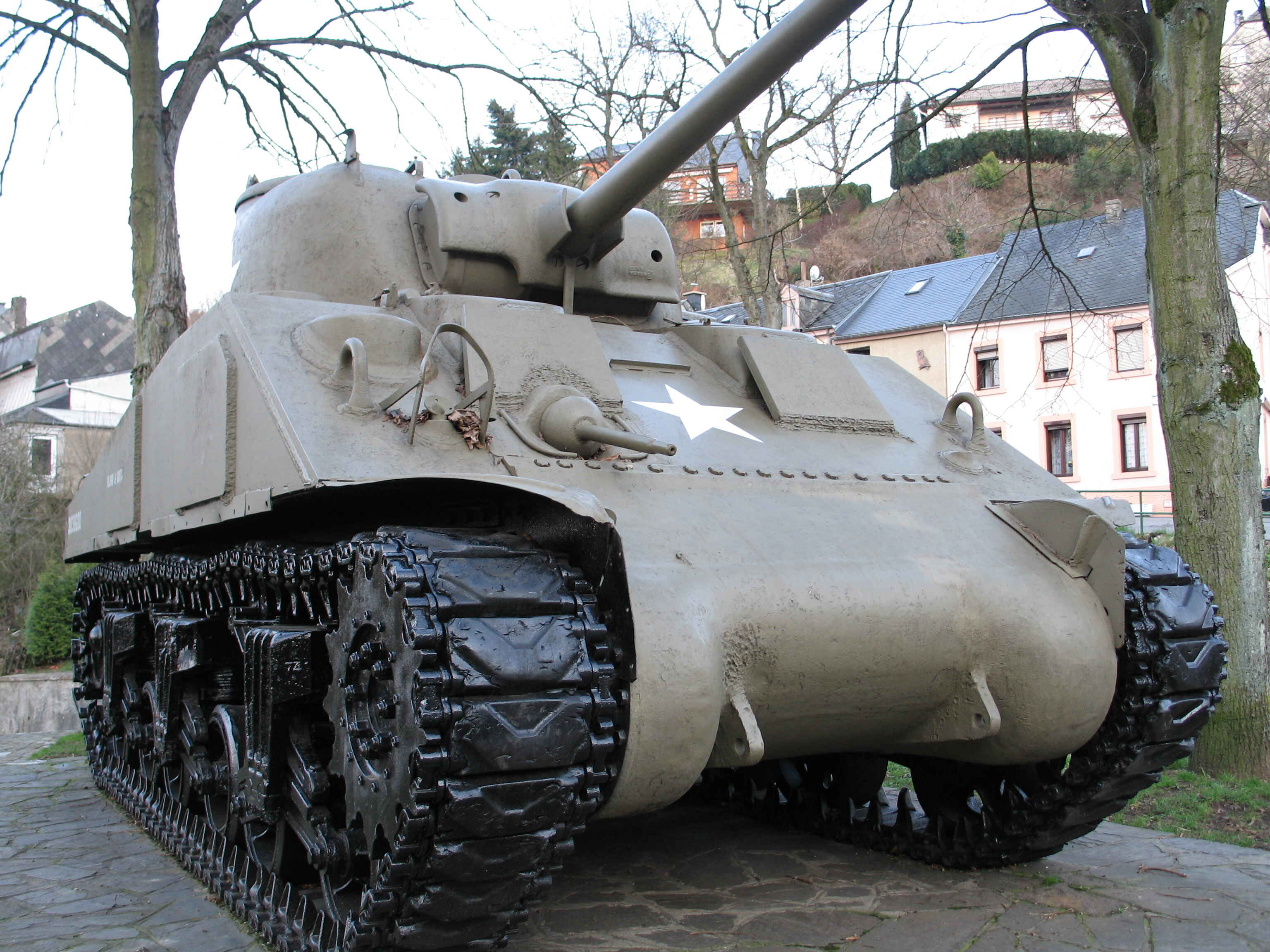 Tanks zu Wolz.